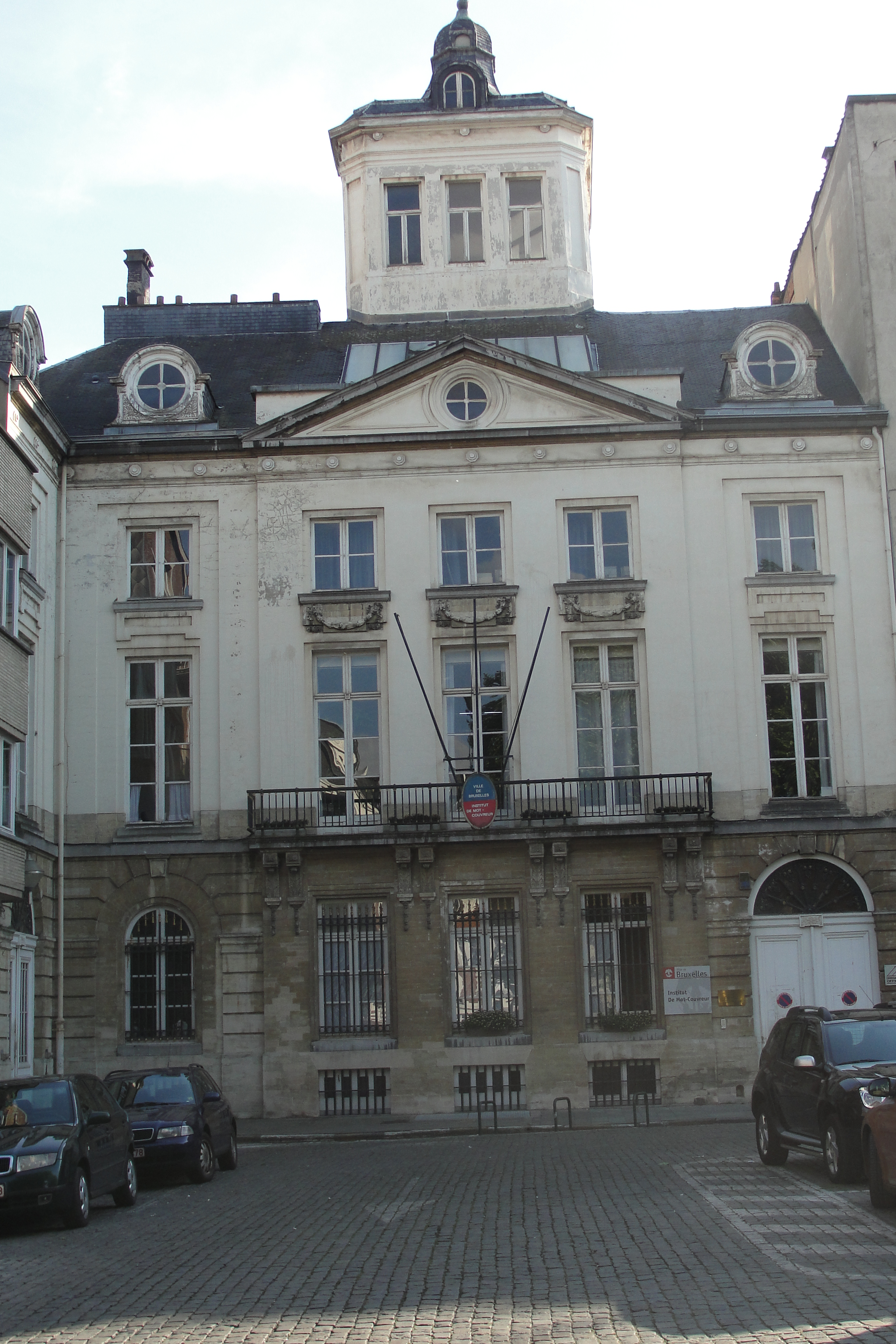 18de-eeuws neoclassicistisch huis op de Nieuwe Graanmarkt te Brussel. Thans school "Institut De Mot-Couvreur"